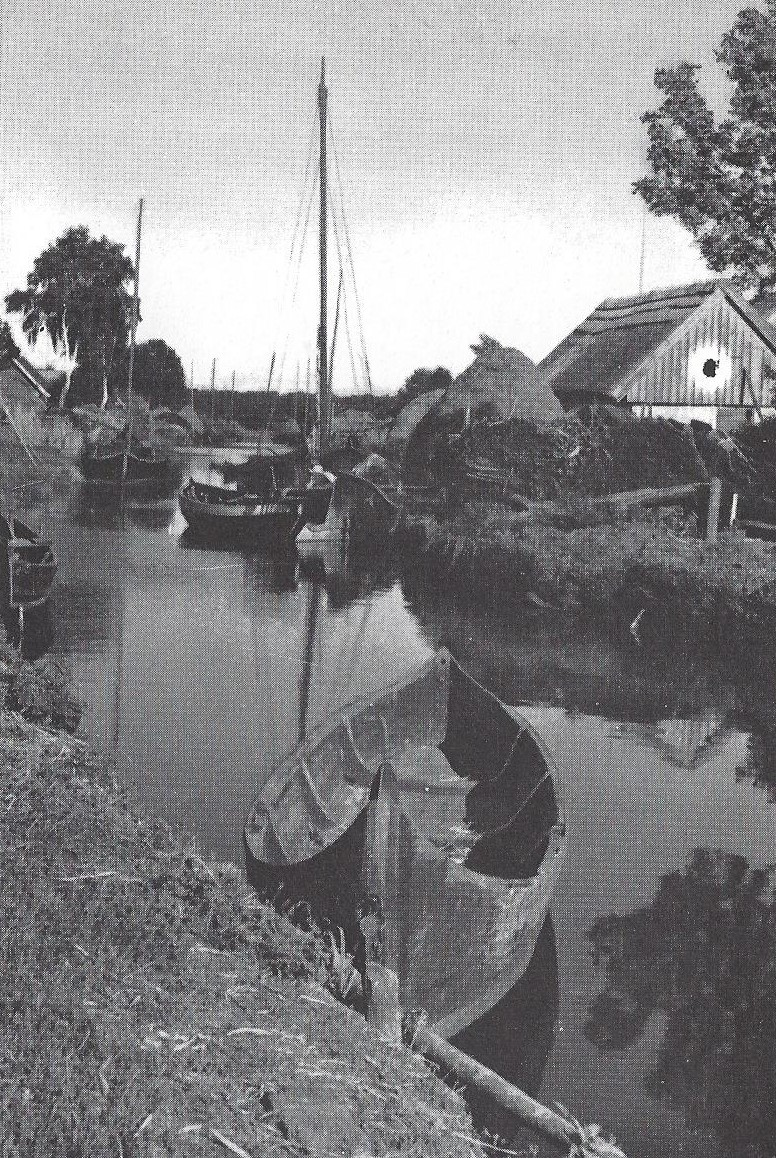 Dorf Loye im Memeldelta